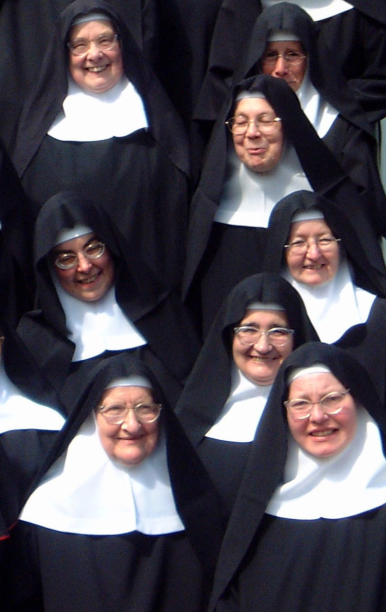 Schwstern der Abtei Mariendonk